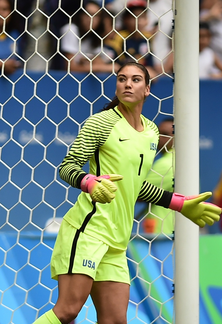 Estádio Nacional de Brasília Mané Garrincha, Brasília, DF, Brasil, 12/8/2016 Foto: Andre Borges/Agência Brasília Estados Unidos e Suécia jogam nesta sexta-feira (12), no Estádio Mané Garrincha, pelas quartas de final do futebol feminino nas Olimpíadas 2016.